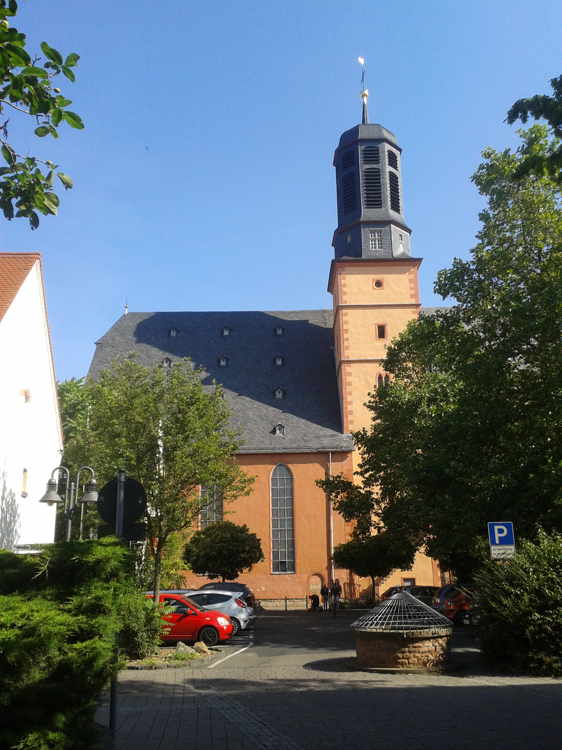 Marienkirche in der Altstadt